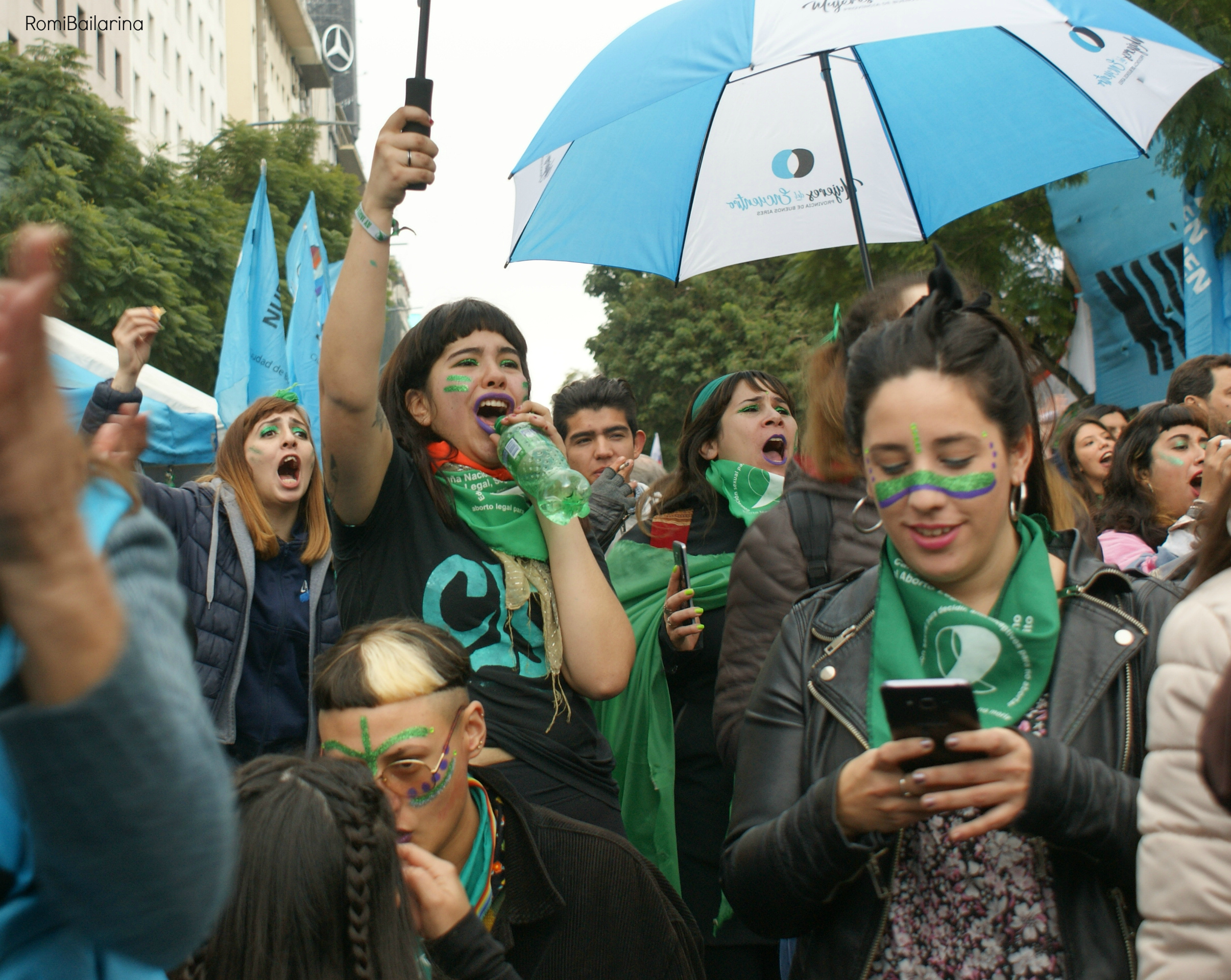 Vigilia por la ley de Interrupción Voluntaria del Embarazo 8A